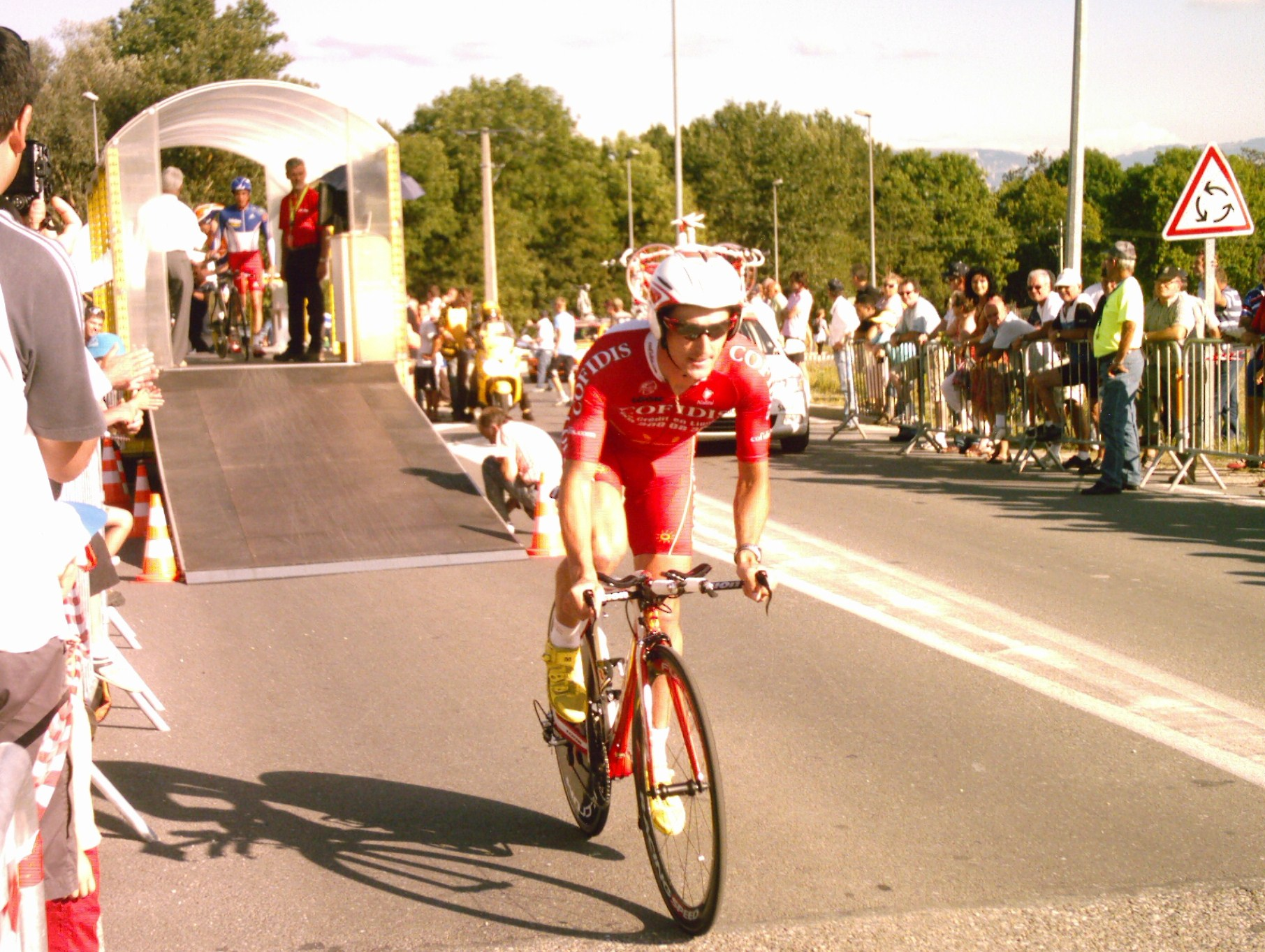 Jean-Eudes Demaret au départ du contre-la-montre de la troisième étape b du Tour de l'Ain 2009.